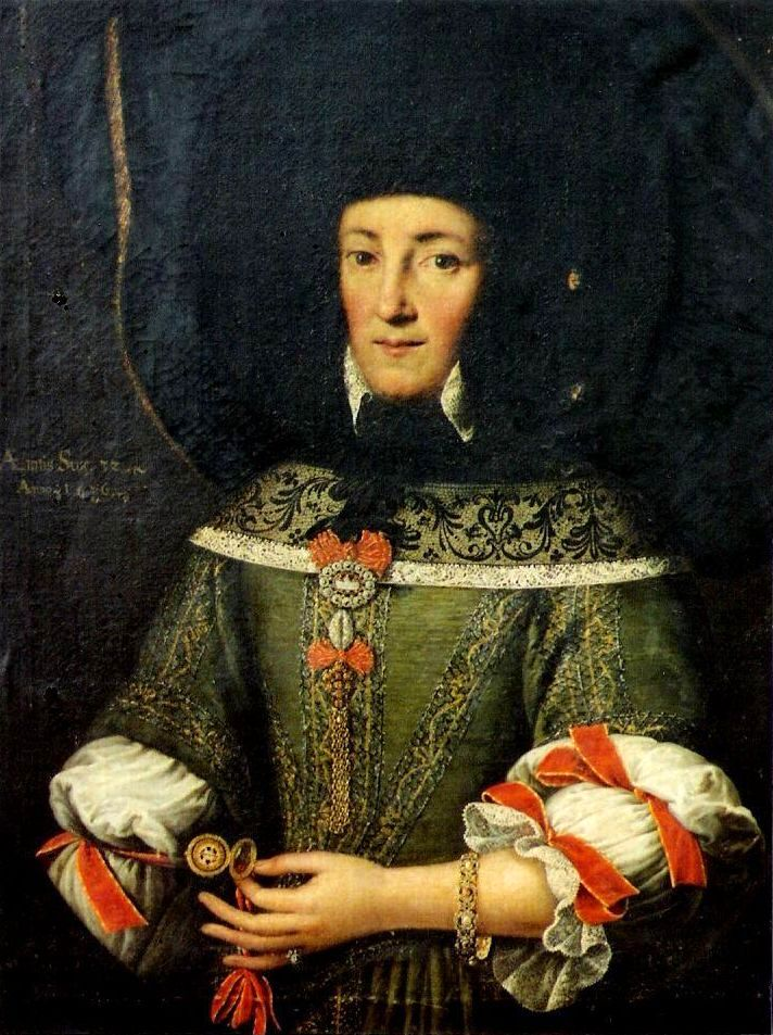 Gemälde von Maria Elisabeth Mohr, geborene von Fleckenstein (Privatbesitz)